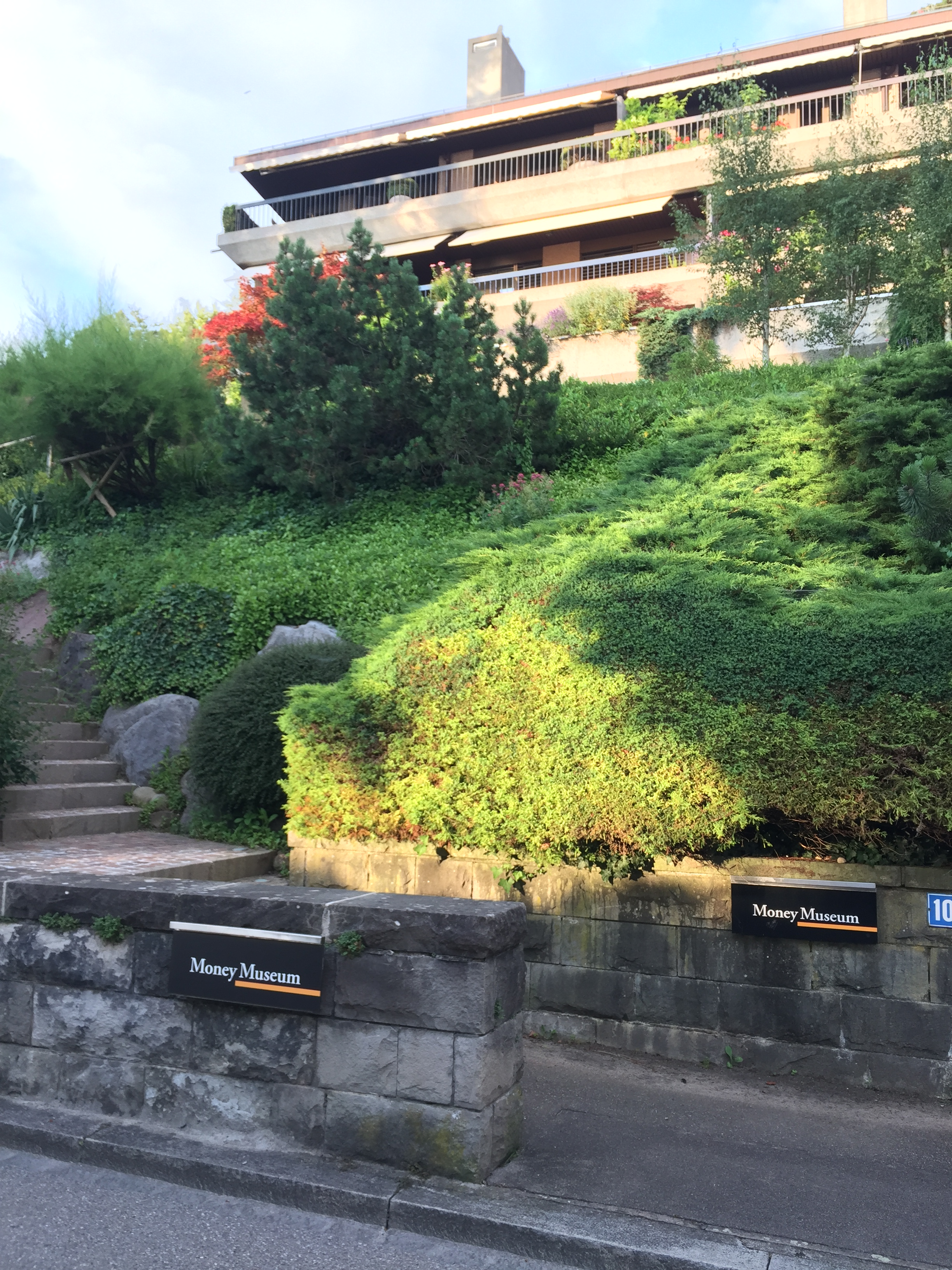 Money Museum at Hadlaubstrasse in Zürich